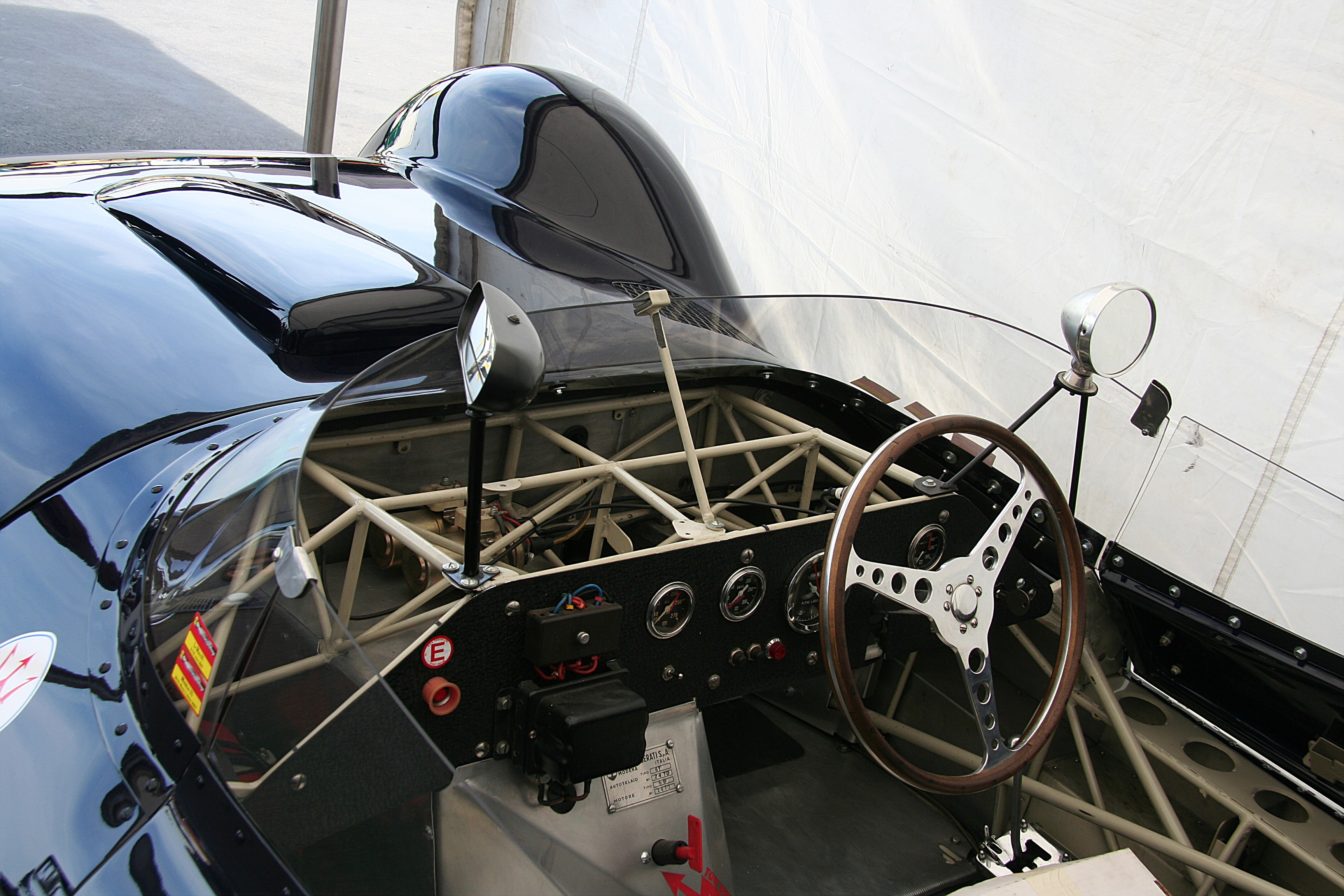 Maserati Tipo 61 – Birdcage, Baujahr 1960